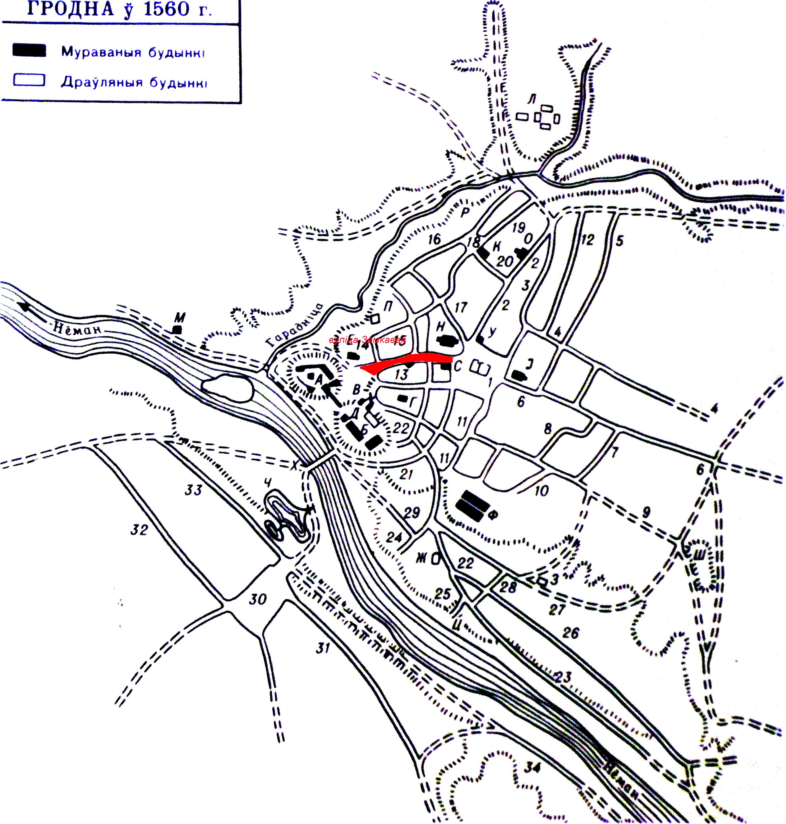 Вуліца Замкавая на мапе Гродна 1560 г.